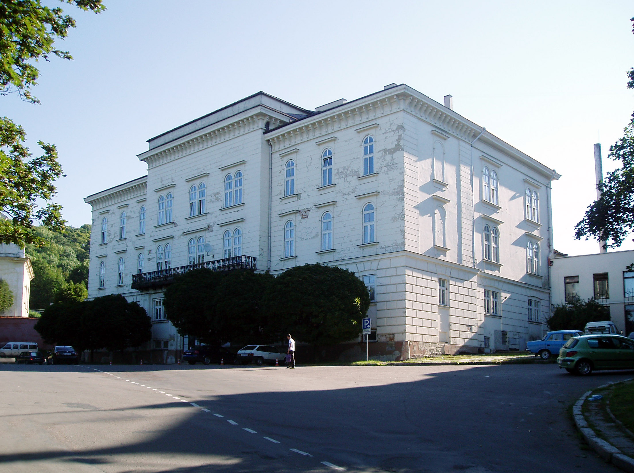 Палац римо-католицьких архієпископів у Львові, на вул. Винниченка, 32